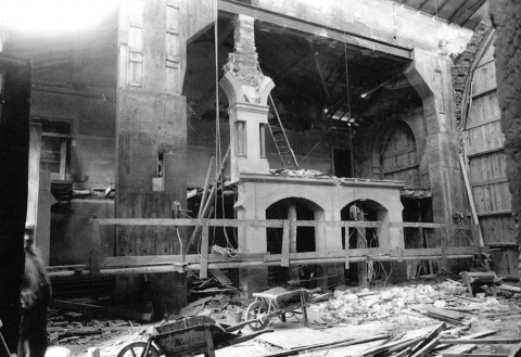 Photographie datant de 1935, montrant le chantier de construction de la Chapelle Sainte Madeleine